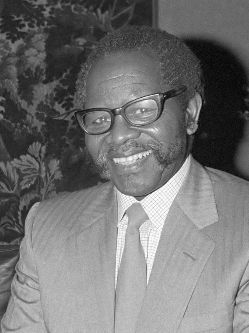 Premier Van Agt (CDA) heeft Oliver Tambo, voorzitter van het African National Congress, ontvangen in het Catshuis 19 oktober 1981